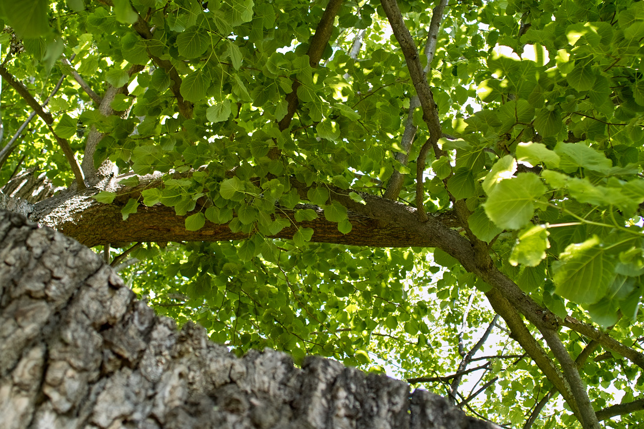 Husova lípa, Chlístov, větve sekundární koruny